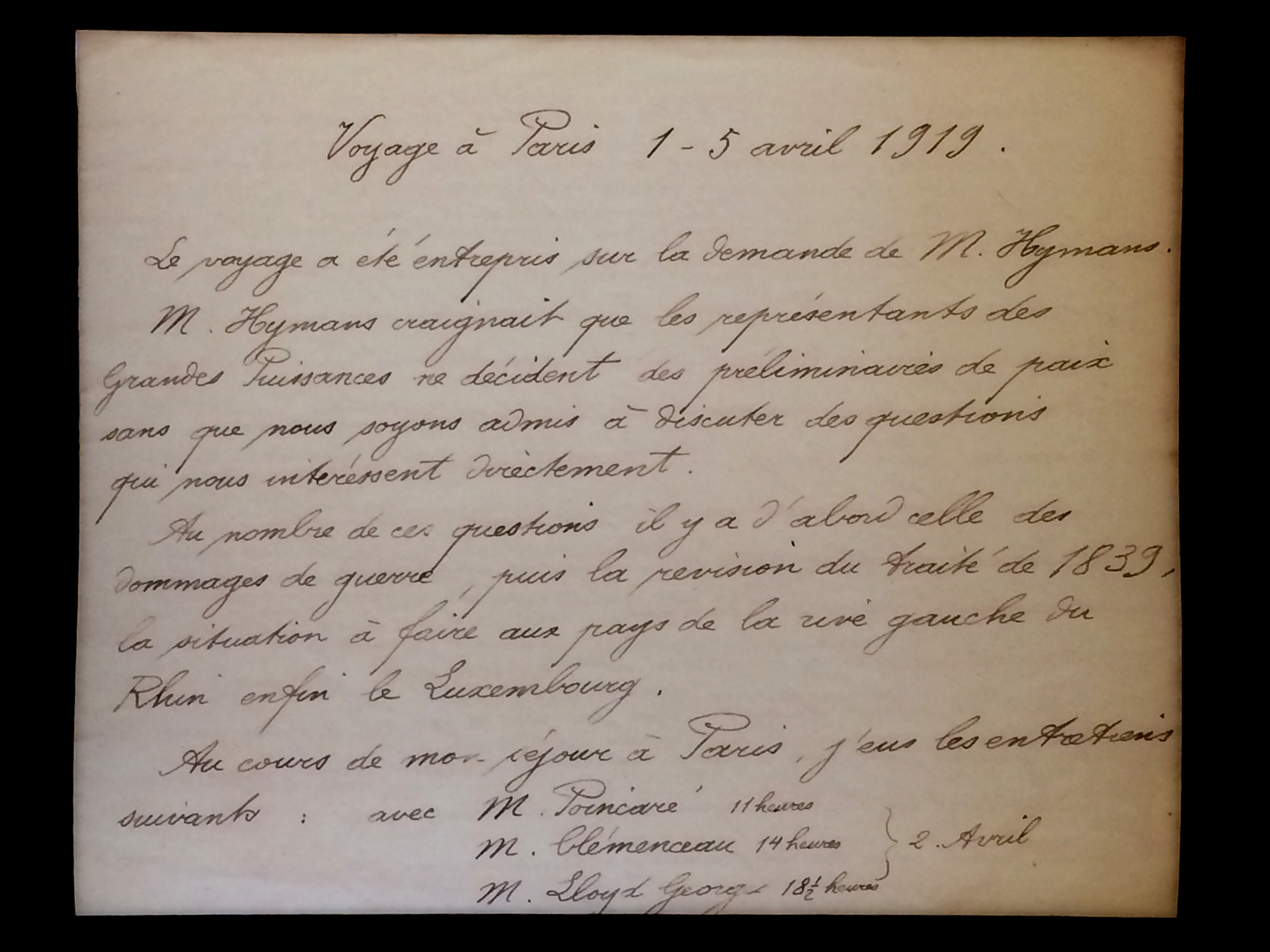 Note de la main du roi Albert I de Belgique résumant son voyage à Paris du 1er au 5 avril 1919. Il s'y était rendu dans le cadre des négociations du Traité de Versailles qui mit fin à la Grande Guerre. Musée de BELvue, Bruxelles.